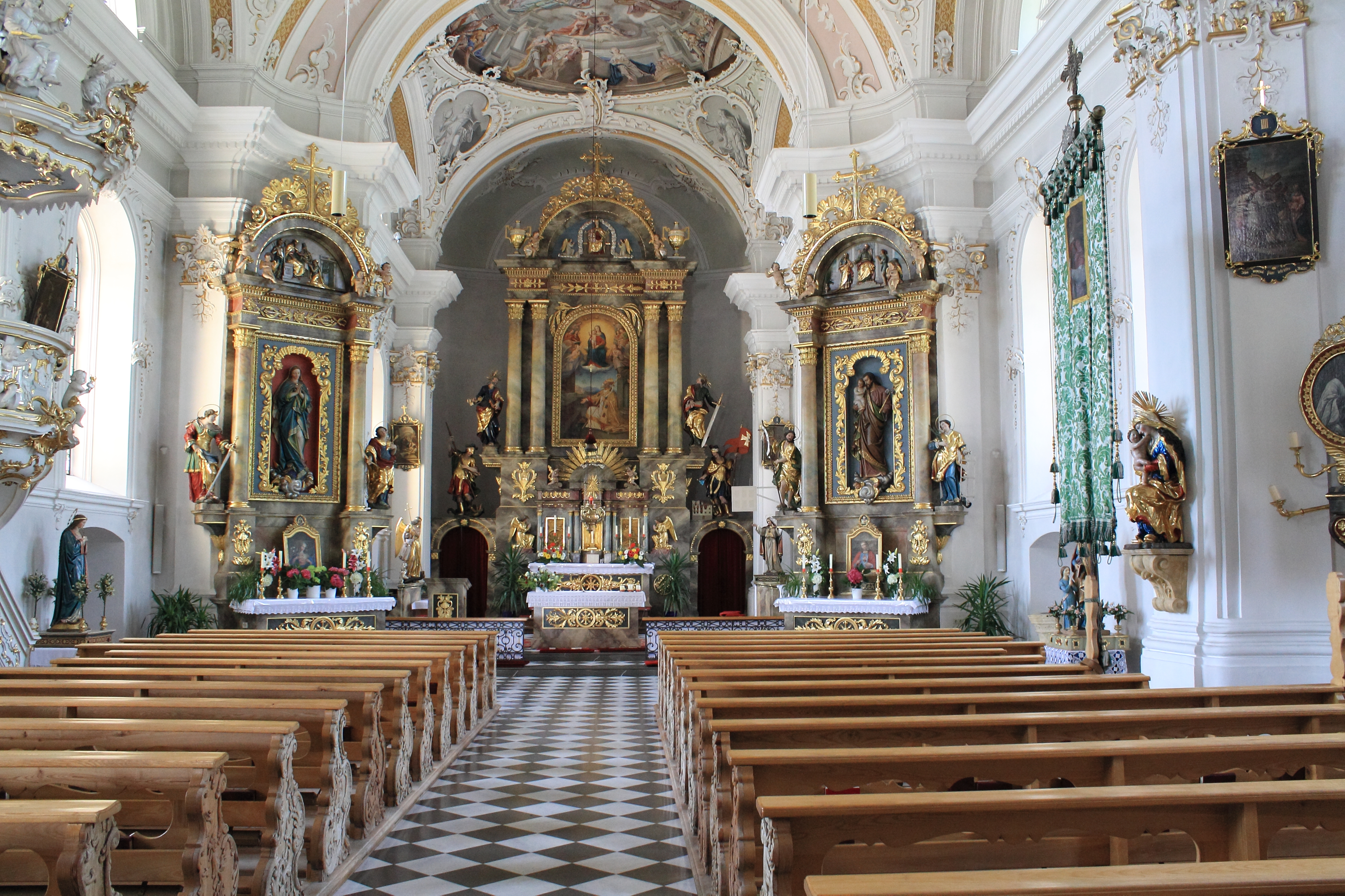 Grins